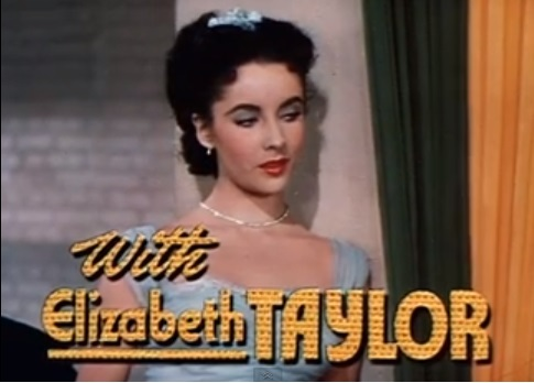 Imagem do trailer do filme "A Date with Judy". Os trailers dos filmes publicados antes de 1964 nos Estados Unidos são de domínio público.